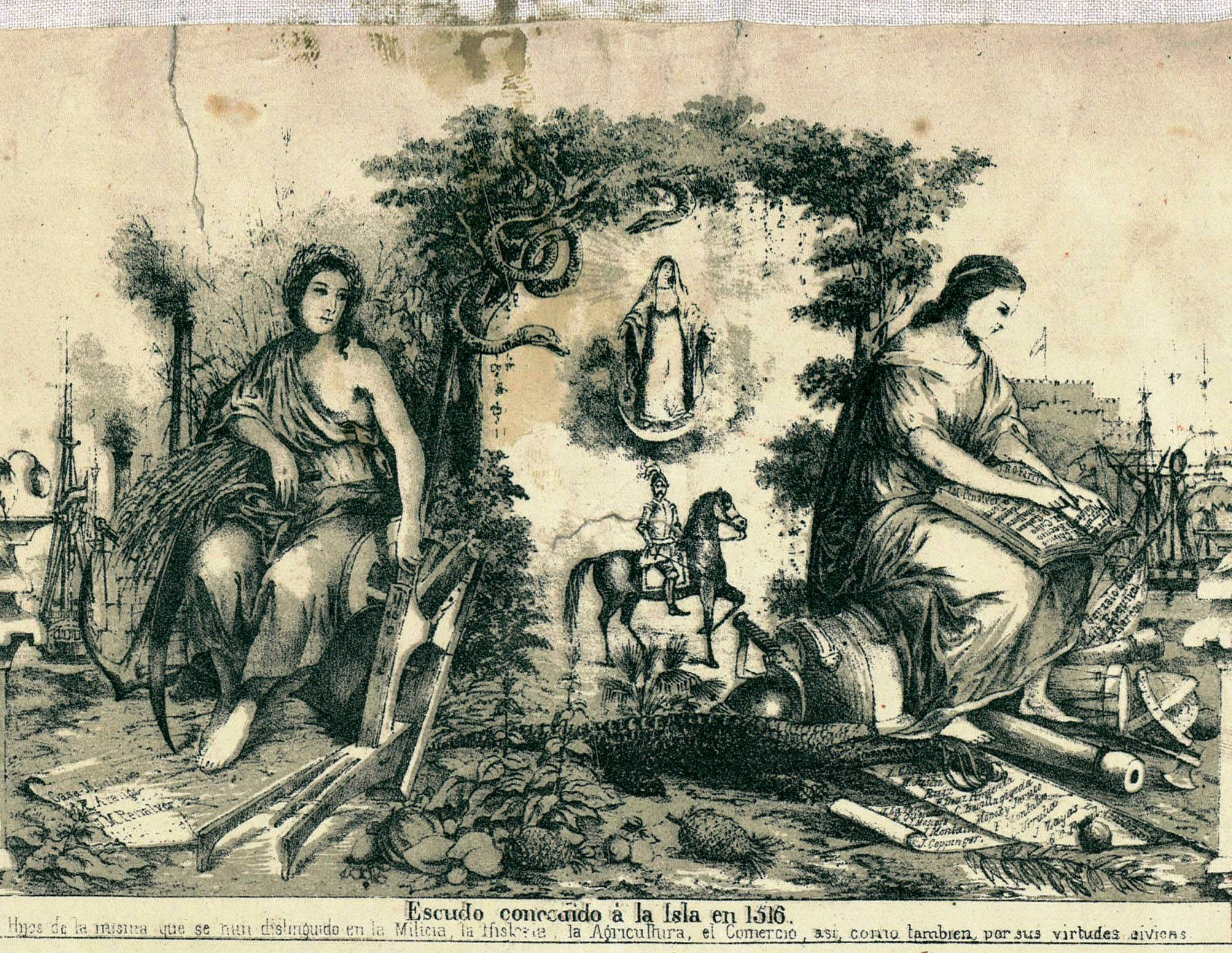 Escudo concedido a la isla en 1516. Fragmento del Mapa Historico Pintoresco Moderno de la Isla de Cuba : Dedicado al Sr. D. Nicolas Peñalver y Peñalver. La parte superior del mapa está ocupada en el centro por el escudo concedido a la isla en 1516.